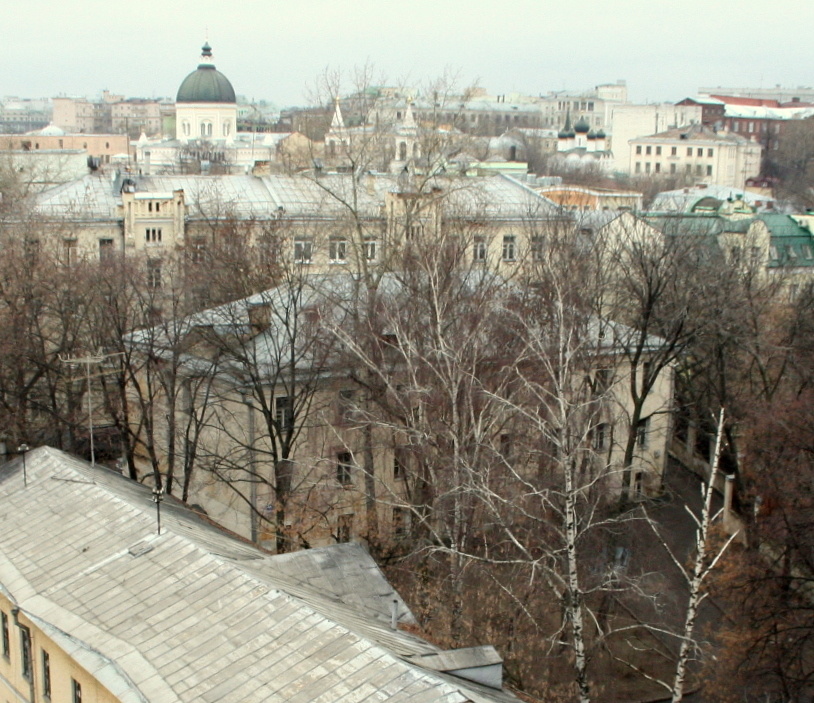 Главный дом усадьбы Лопухиных-Кирьяковых-Волконских в котором в 1870 году родился великий русский композитор А.Н.Скрябин. Угол Хитровской площади и Хитровского переулка.